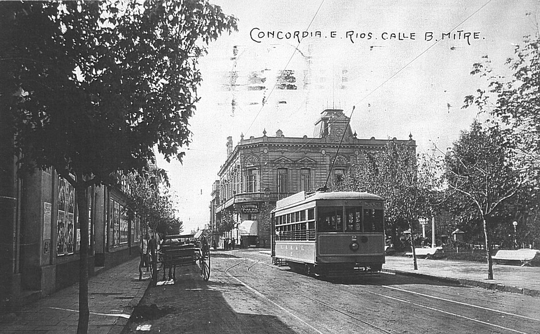 Tranvía por la calle B. Mitre, en Concordia, Entre Ríos, Argentina.